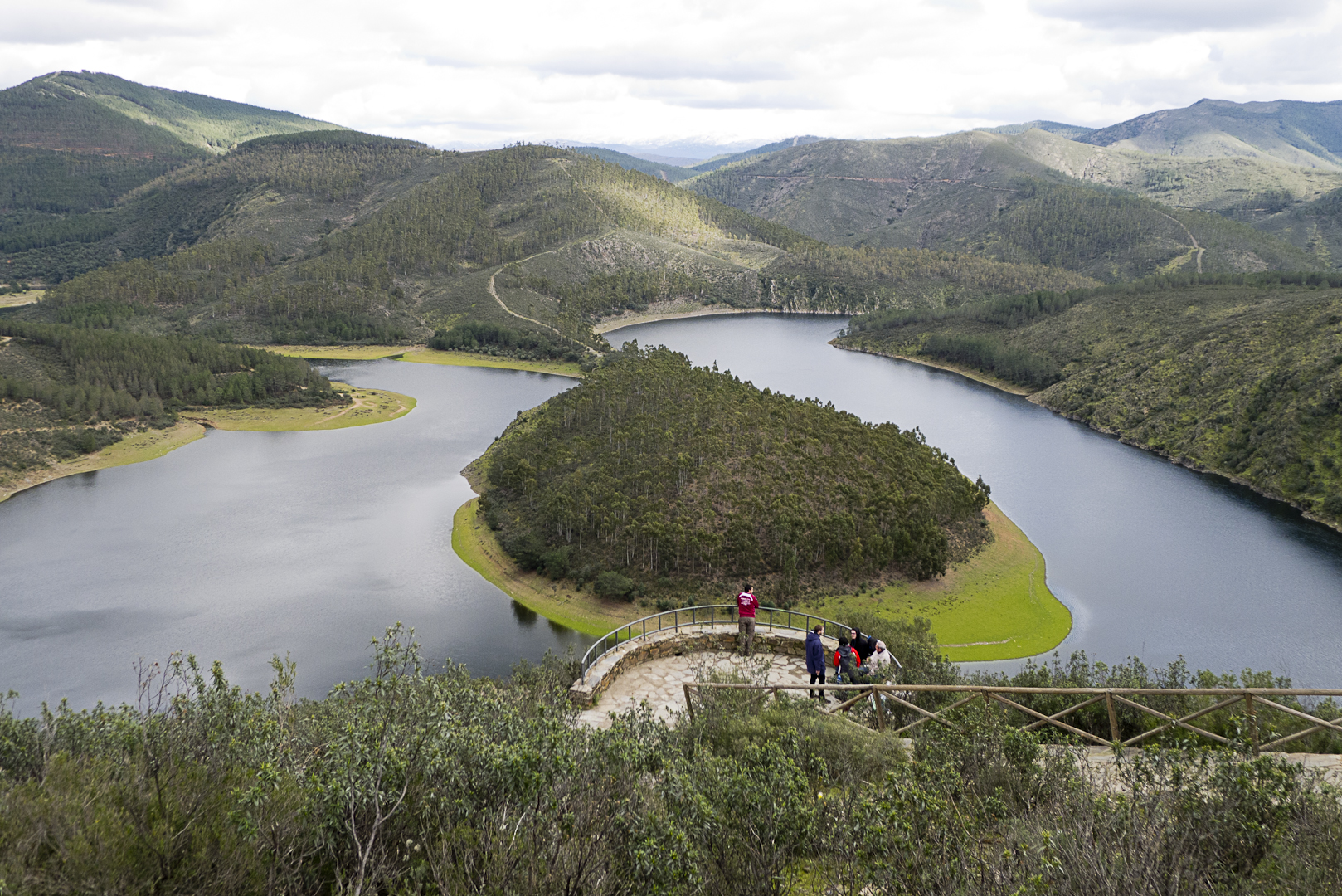 Spain-Meandro de Riomalo de Abajo-P1250094